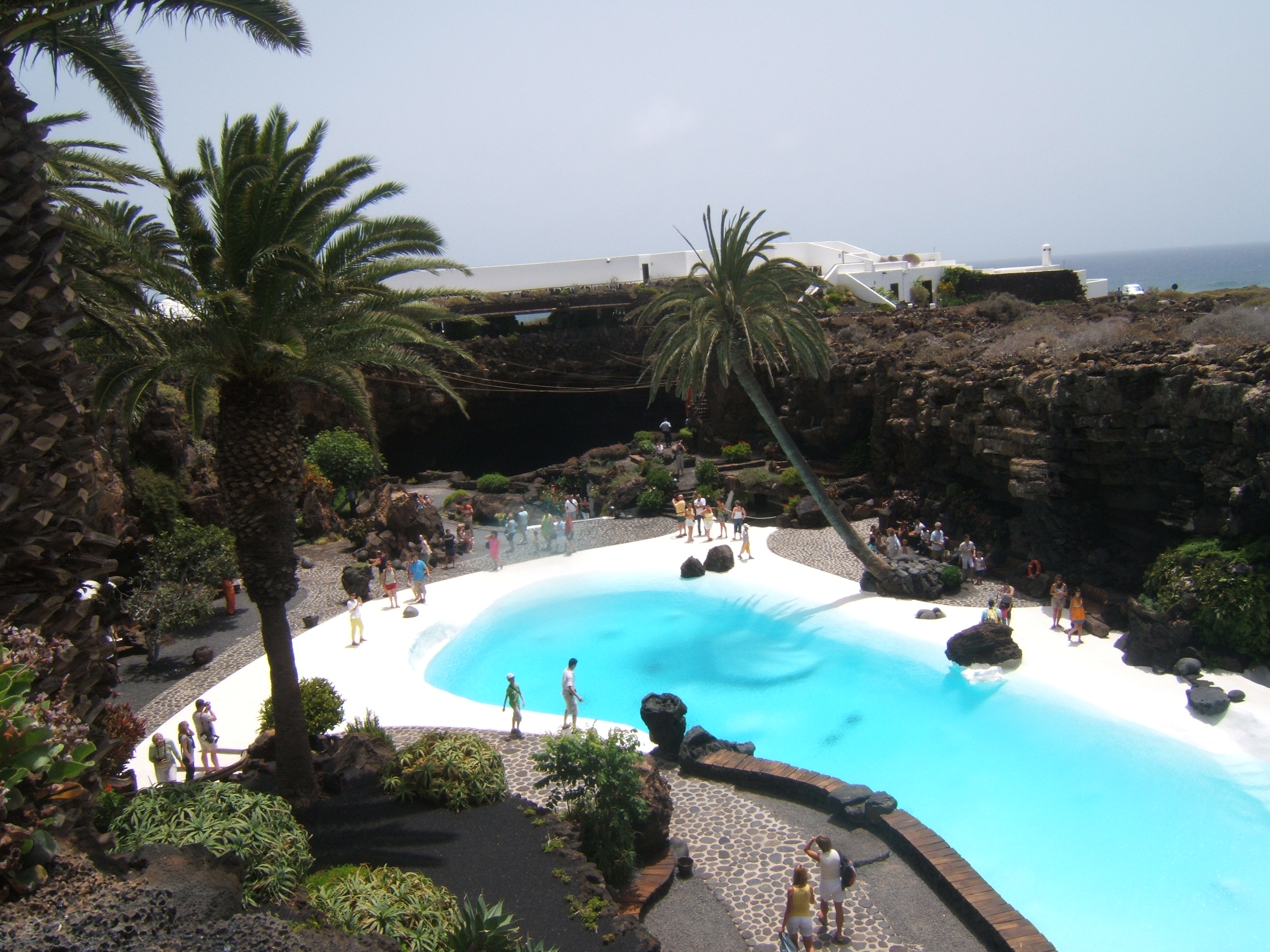 Jameos del Aqua - Lanzarote/Canary Islands